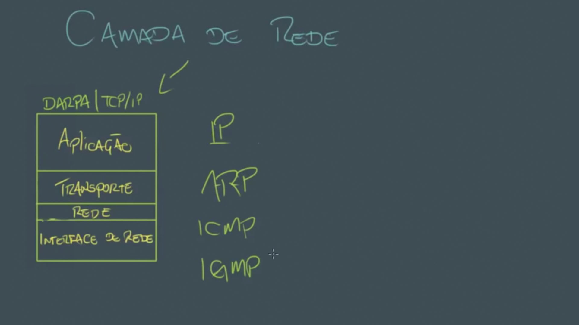 Camada de Rede TCPIP